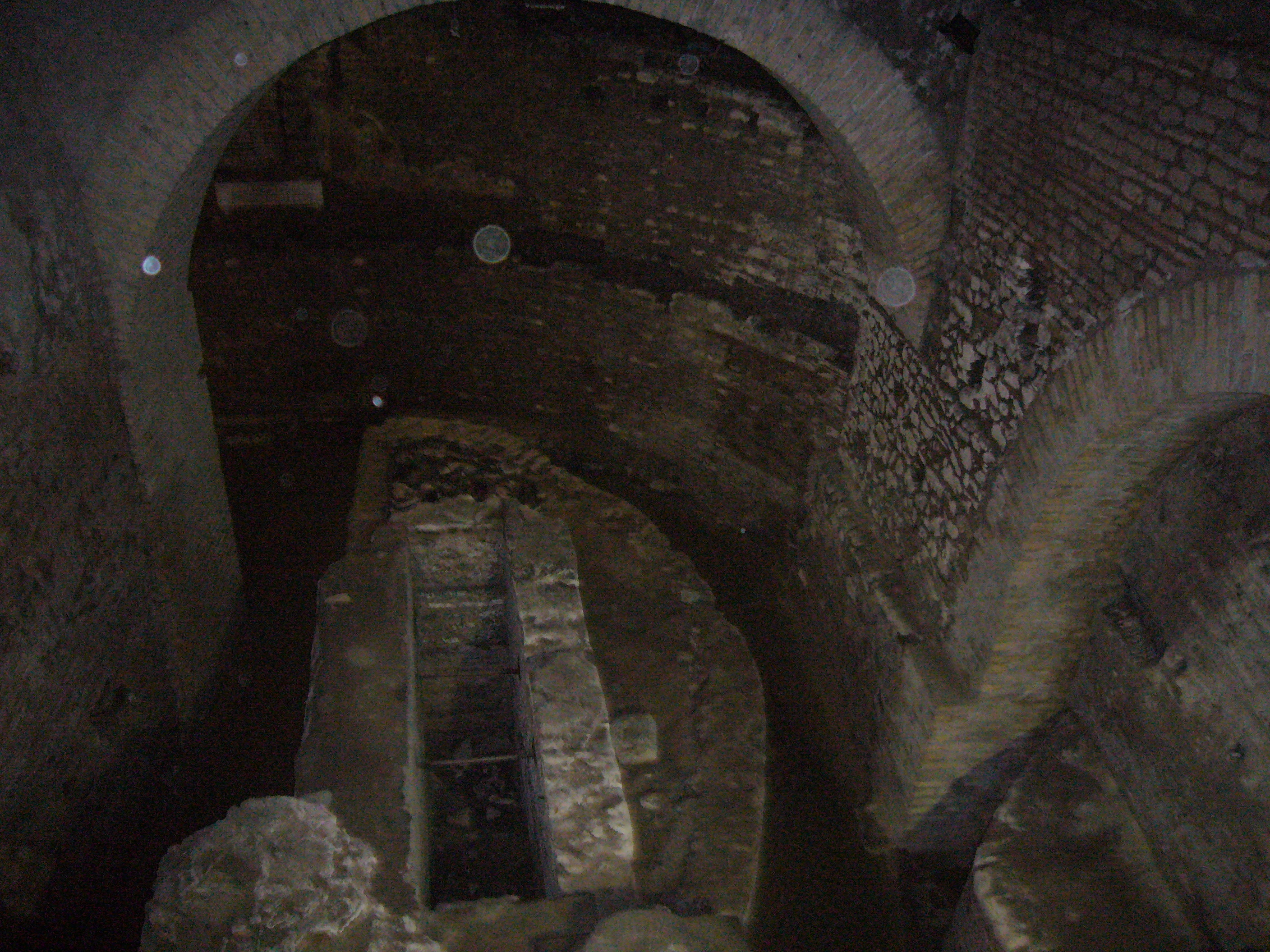 Roma, basilica sotterranea di san Crisogono: abside e cripta semianulare